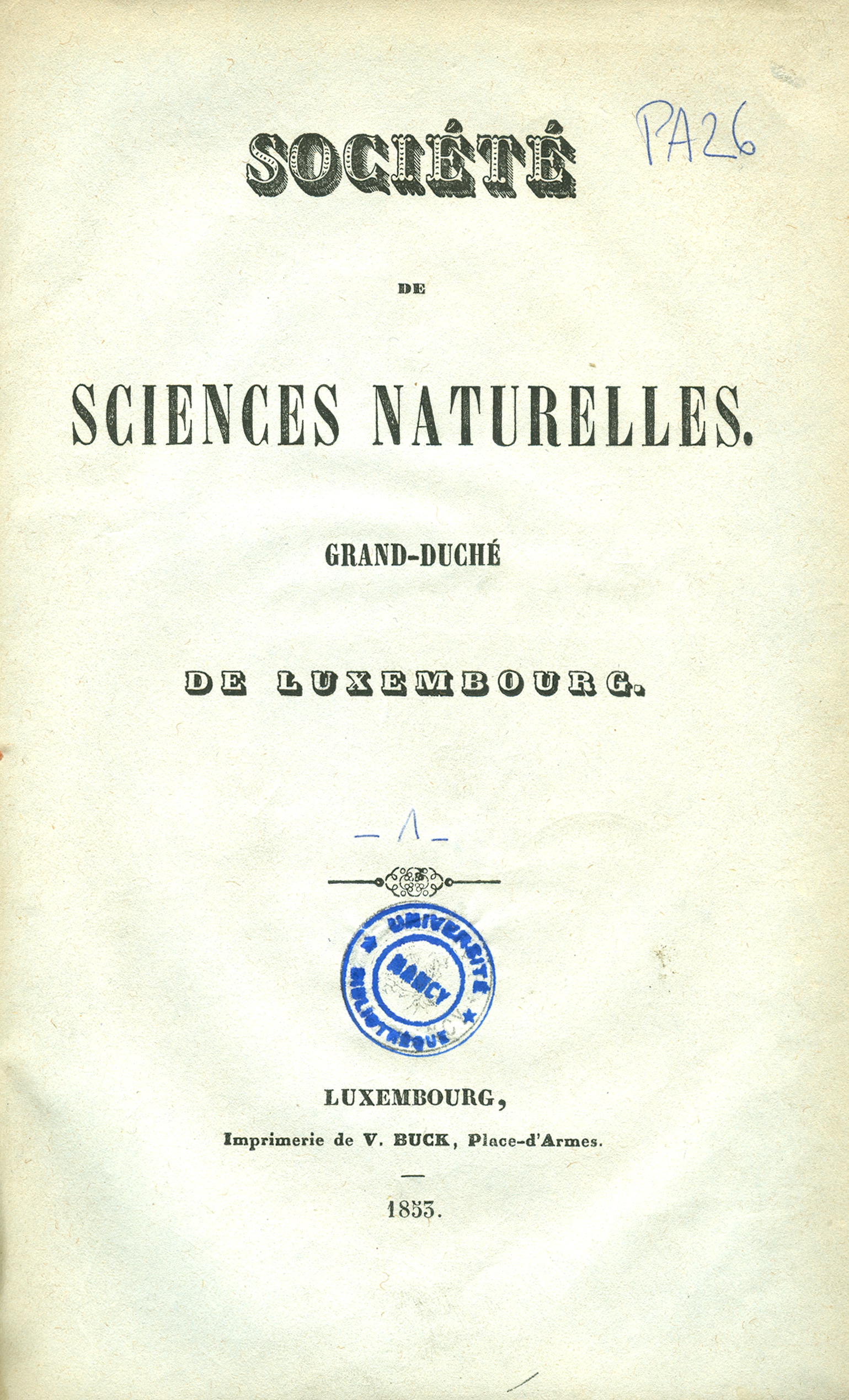 First volume of: Bulletin de la Société des sciences naturelles du Grand-Duché de Luxembourg. Luxembourg 1853.